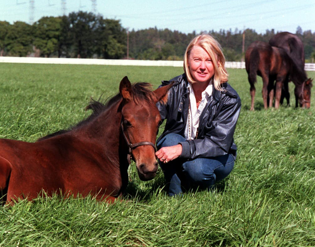 Margareta Wallenius-Kleberg med en fölunge på Menhammar stuteri.